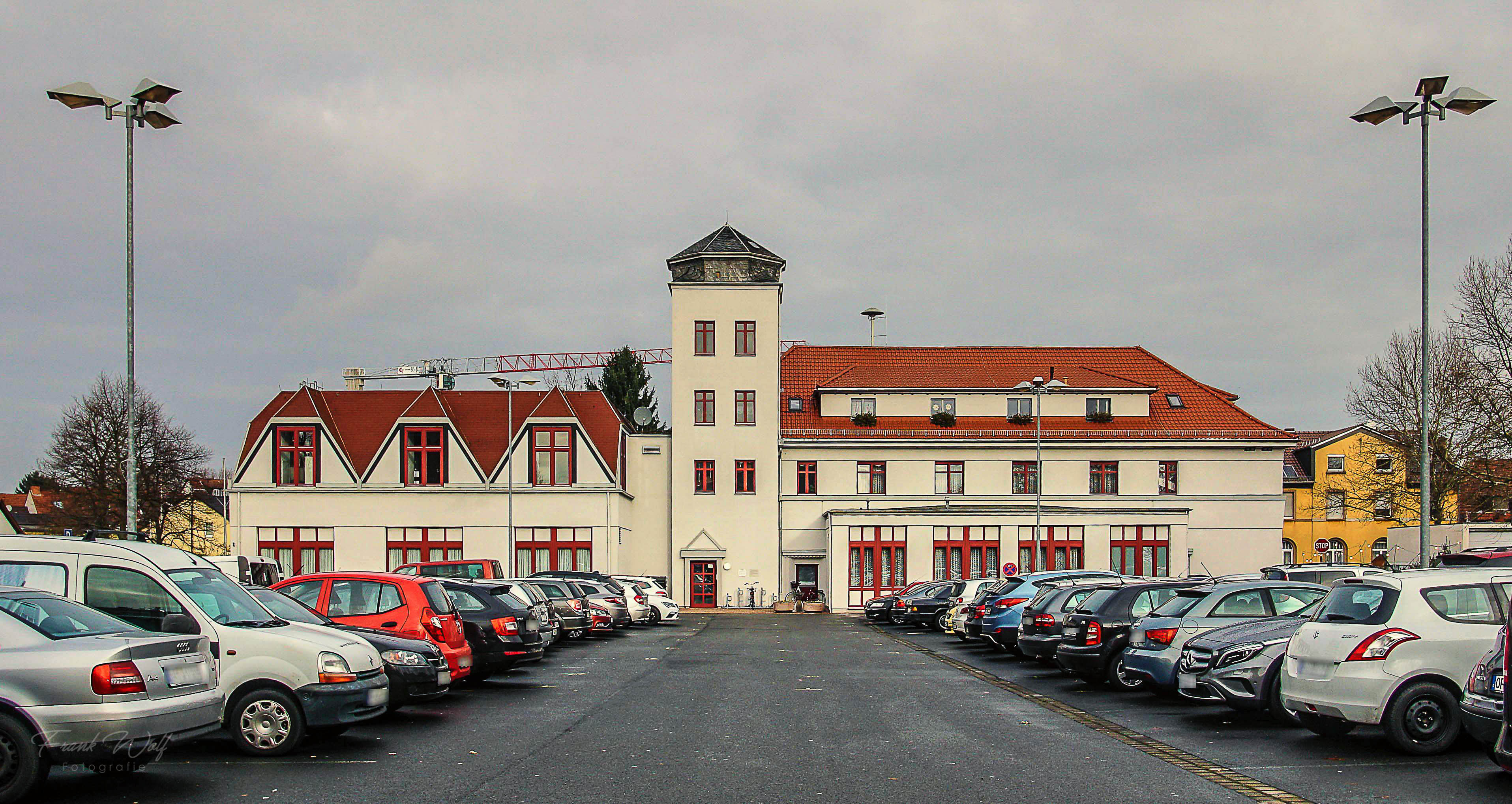 Sitz vieler Isenburger Vereine